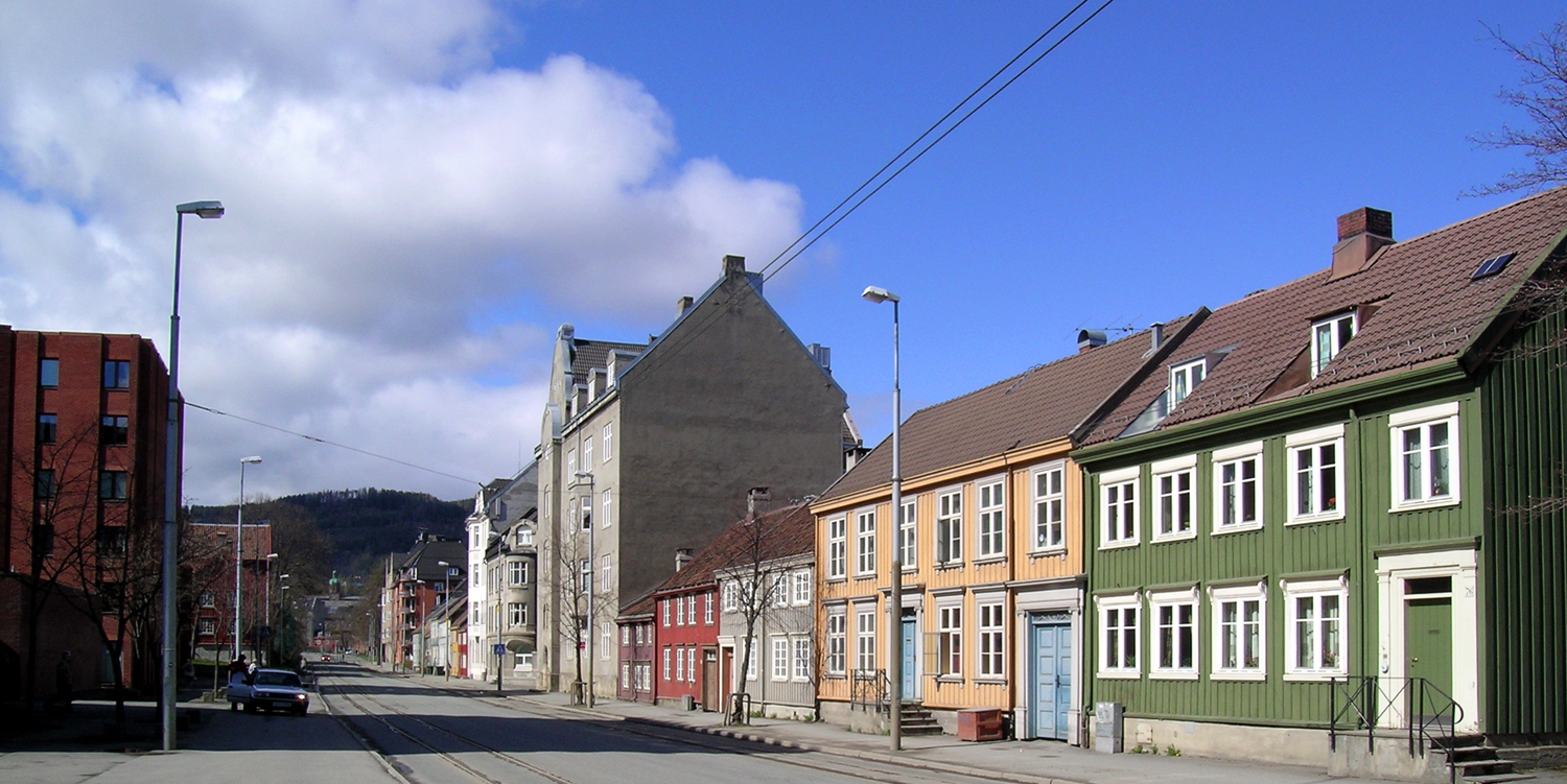 Kongens gate, Trondheim. Sett fra Hospitalskirken mot Ila.